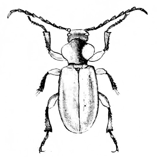 Anoploderma bicolor